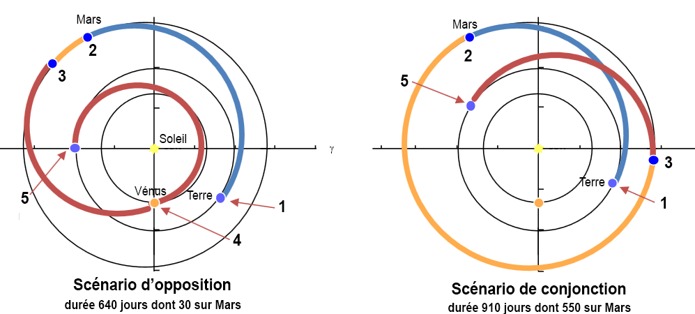 Scénarios des missions habitées martiennes : opposition et conjonction